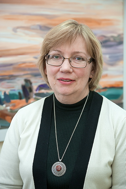 Renate Pajusalu, Tartu Ülikool, eesti ja üldkeeleteaduse instituut